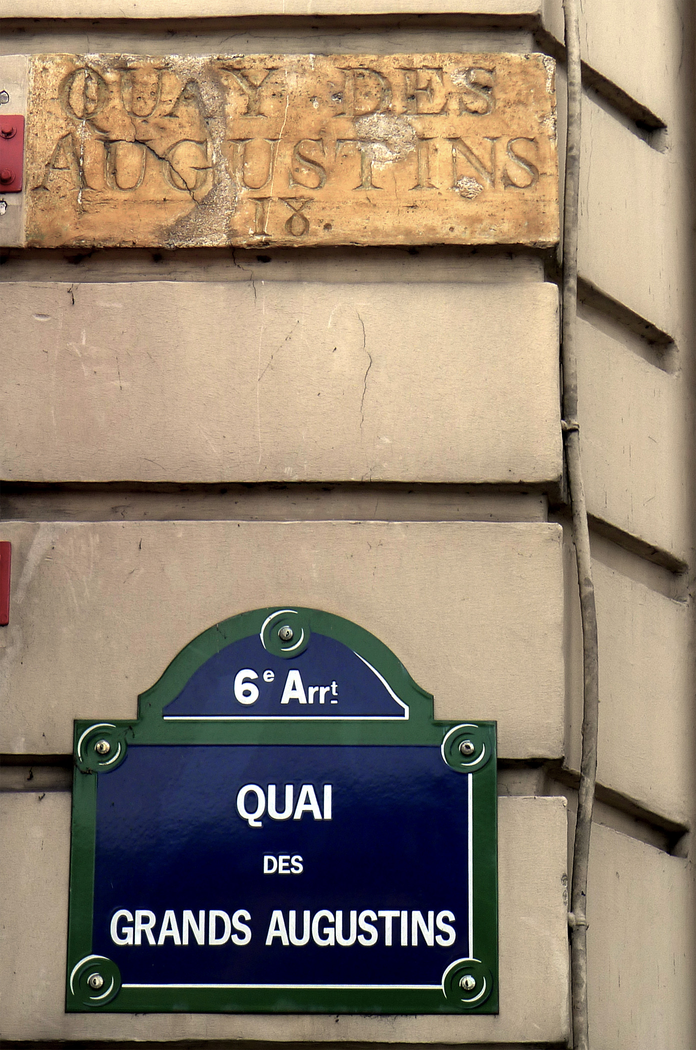 Quai des Grands-Augustins (Plaques et ancien nom) - Paris VI